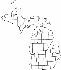 Cadillac, Michigan.